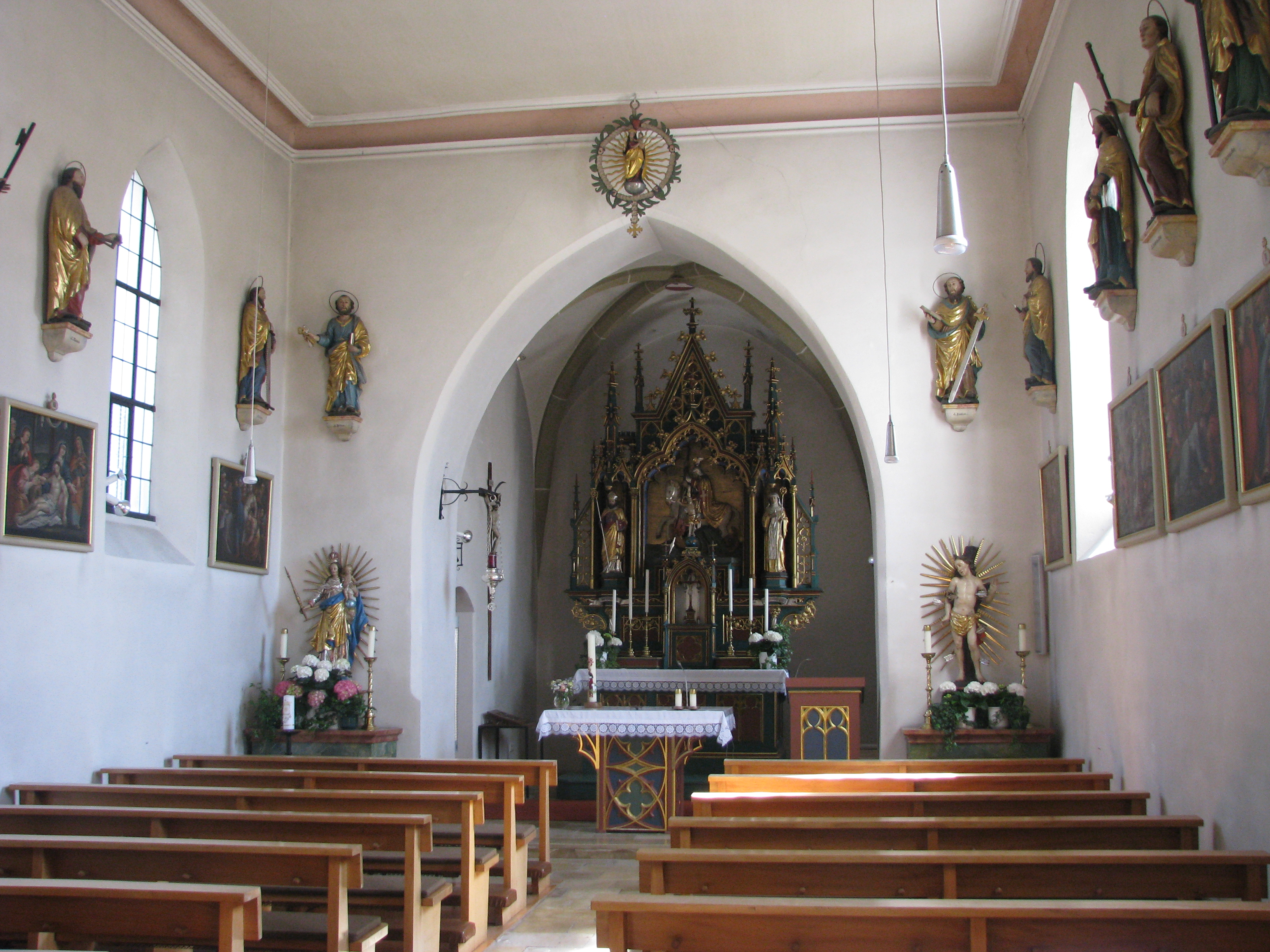 Loderbach, Ortsteil der Gemeinde Berg bei Neumarkt in der Oberpfalz, Blick in die Filialkirche St. Georg, neugotische Einrichtung